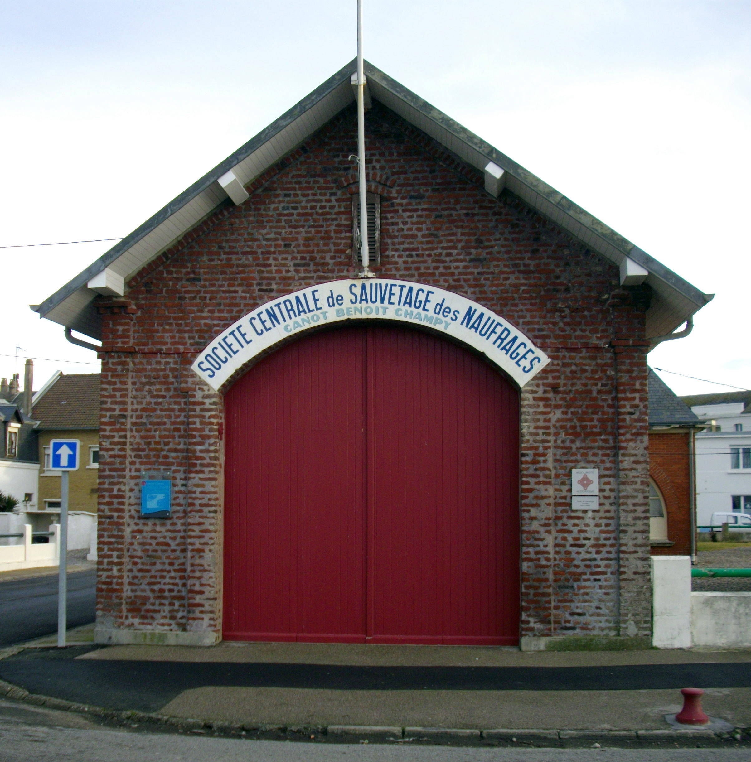 Abri du canot de sauvetage Benoit Champy (1887) à Cayeux-sur-Mer